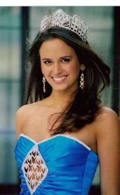 Jena Sims, Miss Georgia Teen USA 2007